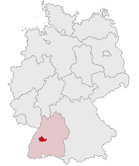 Landkreis Freudenstadt, Baden-Württemberg, Germany